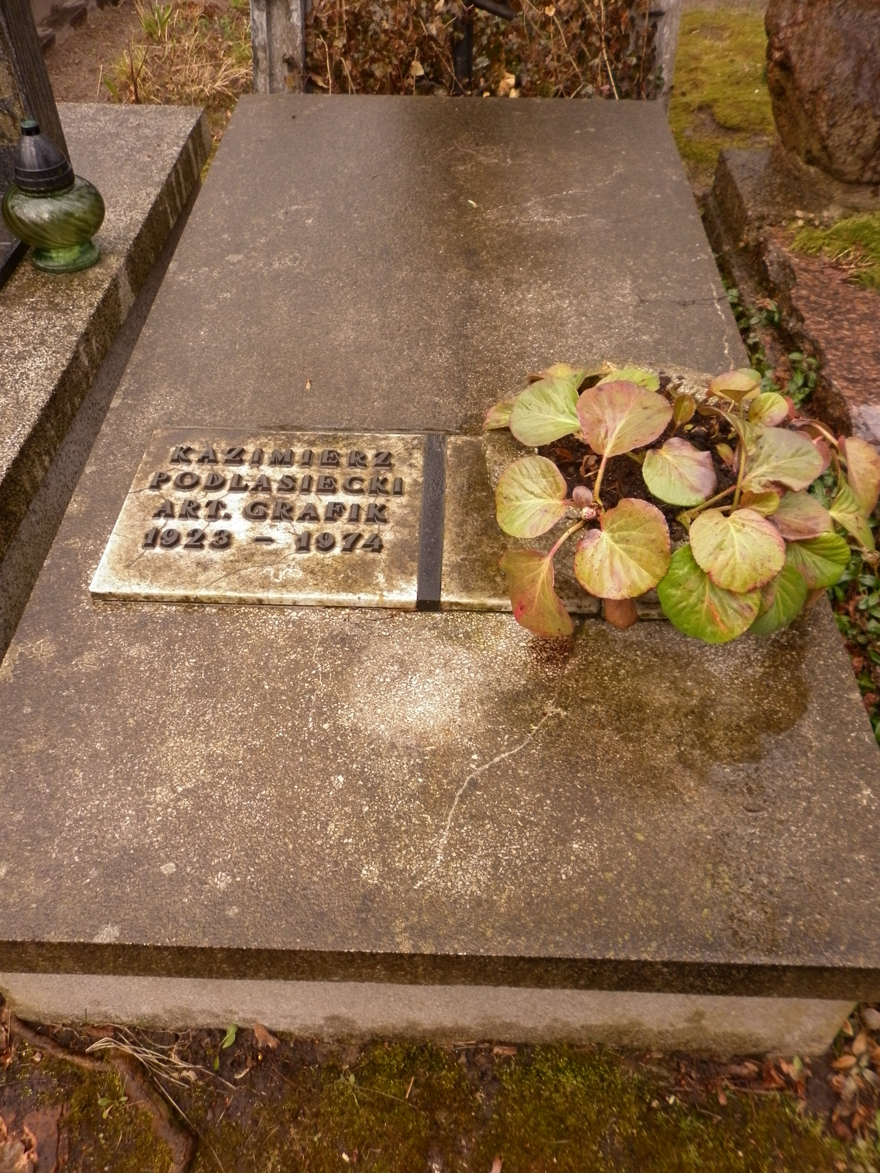 Grób Kazimierza Podlasieckigo na Cmentarzu Wojskowym na Powązkach